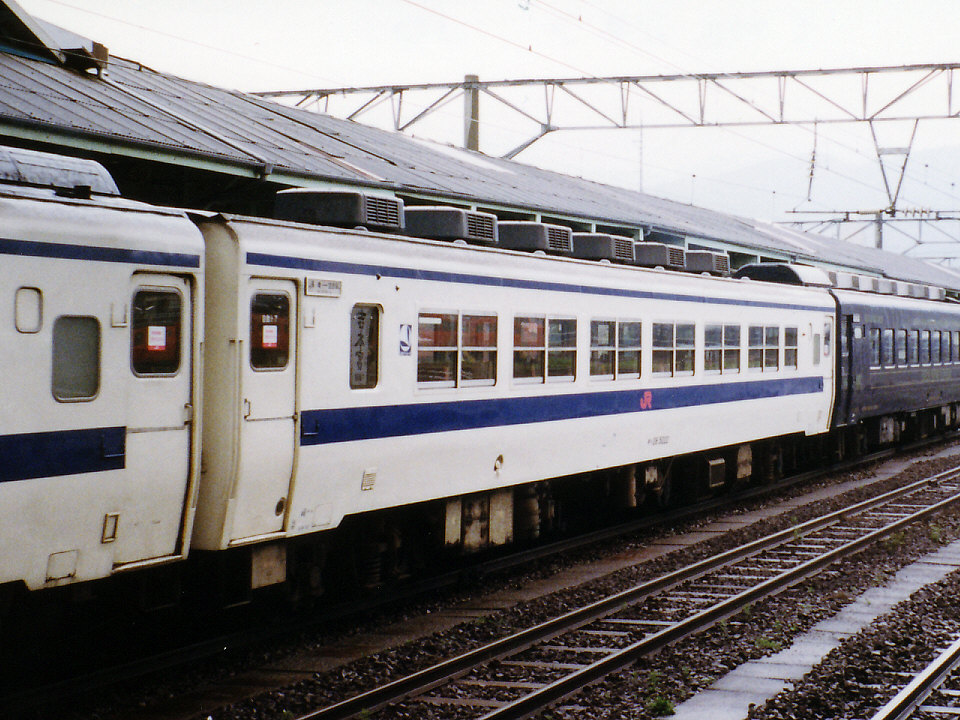 JR九州キハ28形5200番台 早岐駅にて